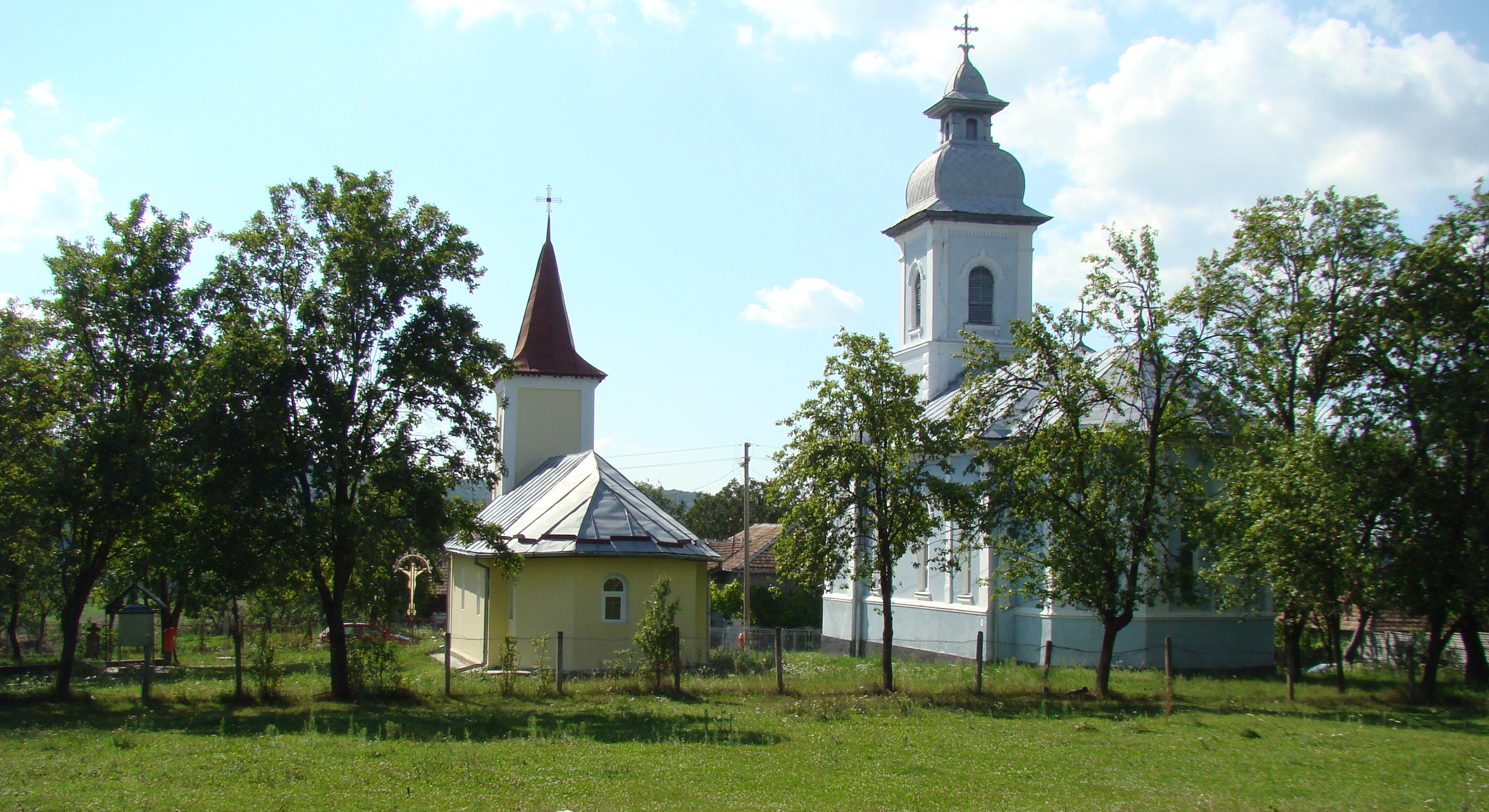 Biserica de lemn „Sfânta Treime” din satul Pădureni, comuna Mintiu Gherlii, județul Cluj